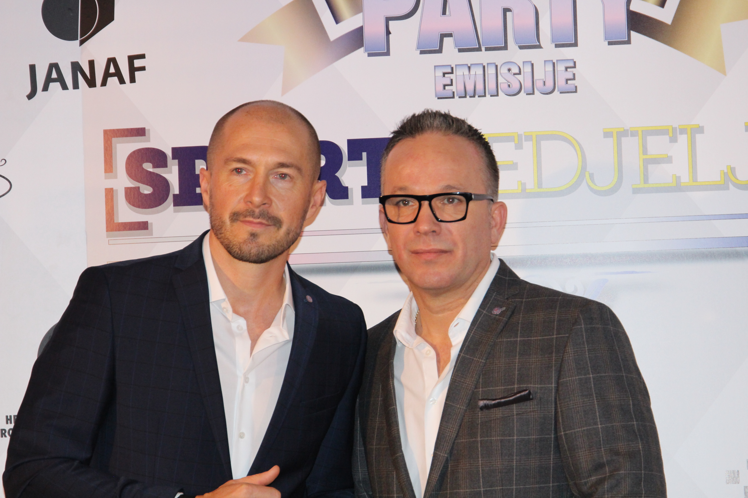 Vlado Turkovic i Ante Breko